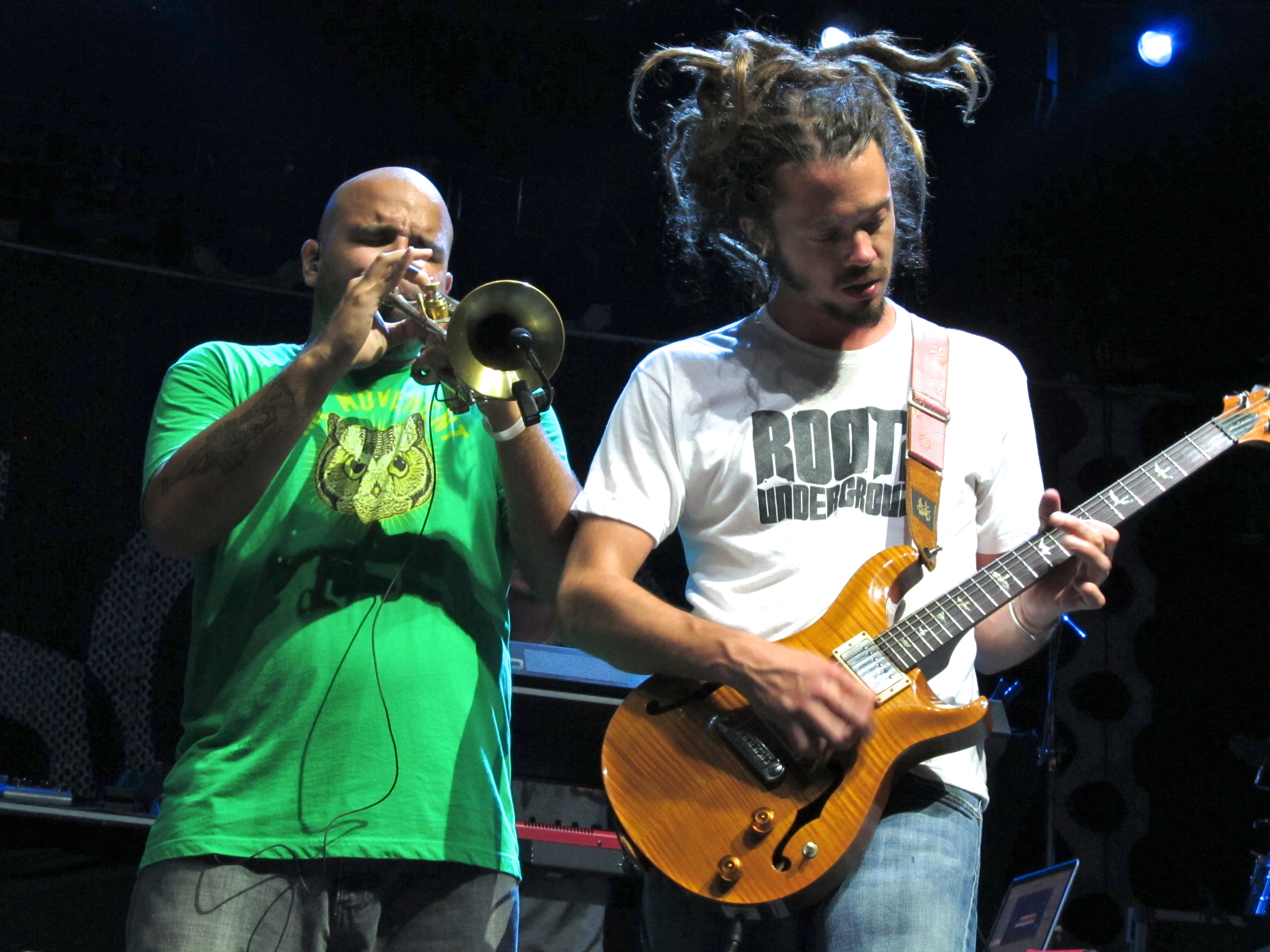 SOJA live at Merriweather Post Pavilion, August 13, 2011. left to right: Rafael Rodriguez, Jacob Hemphill